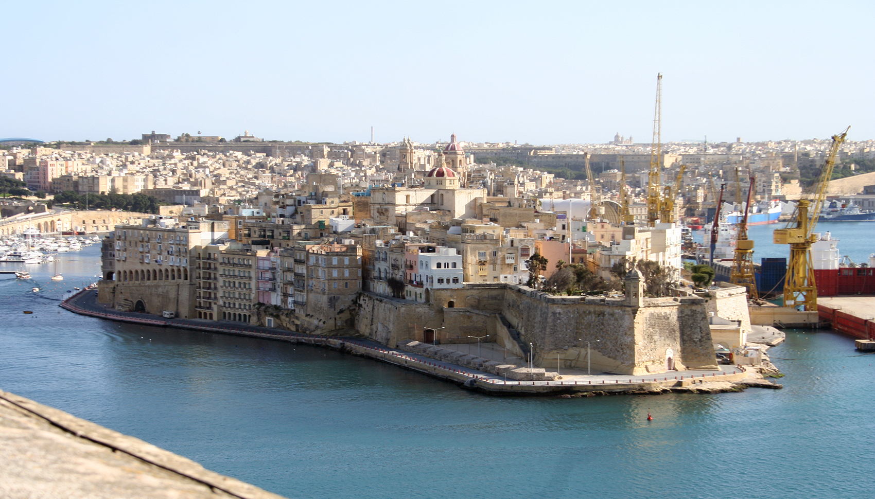 Malta, Senglea (seen from Valletta)